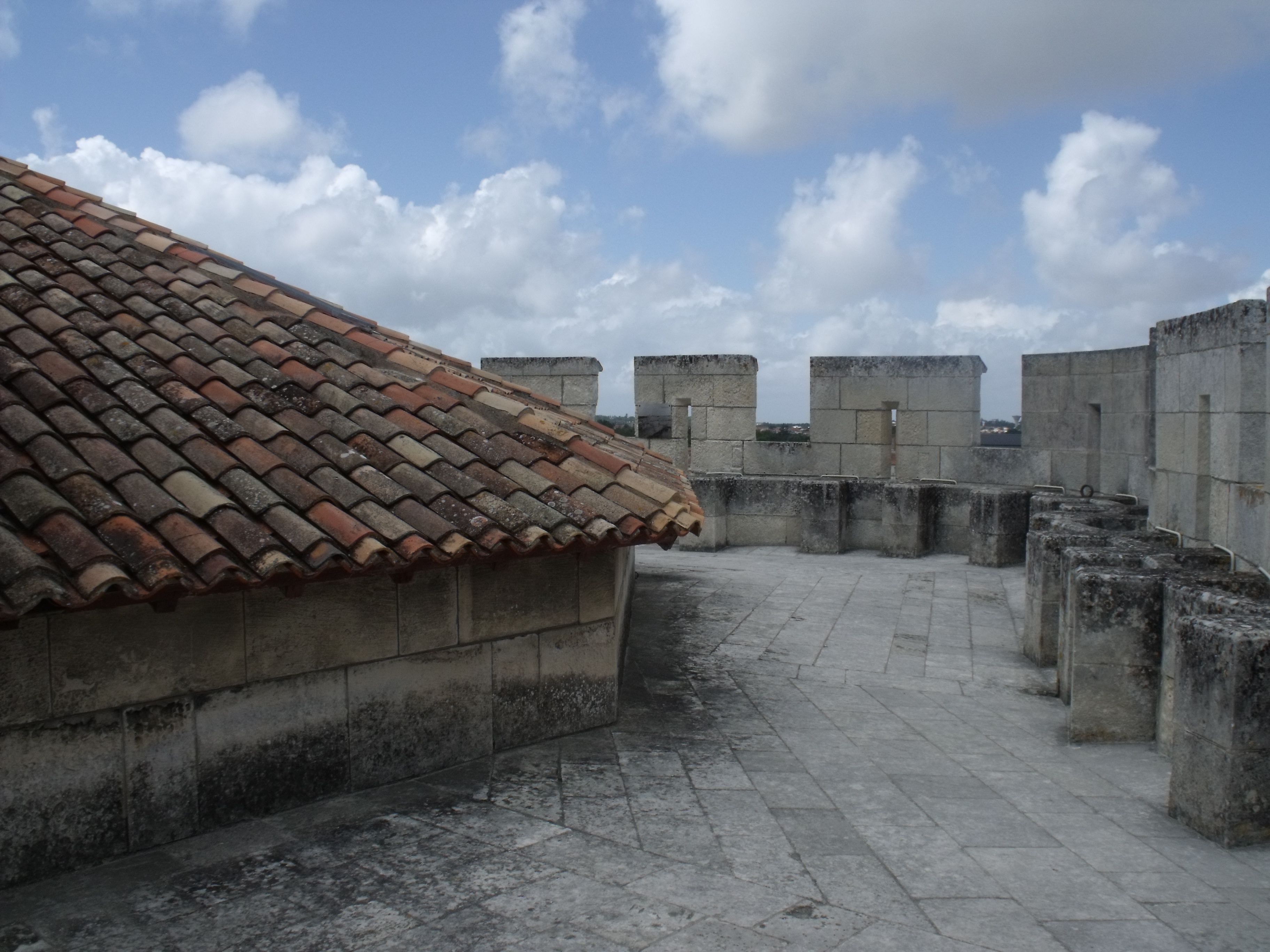 Torre de San Nicolás en La Rochela.